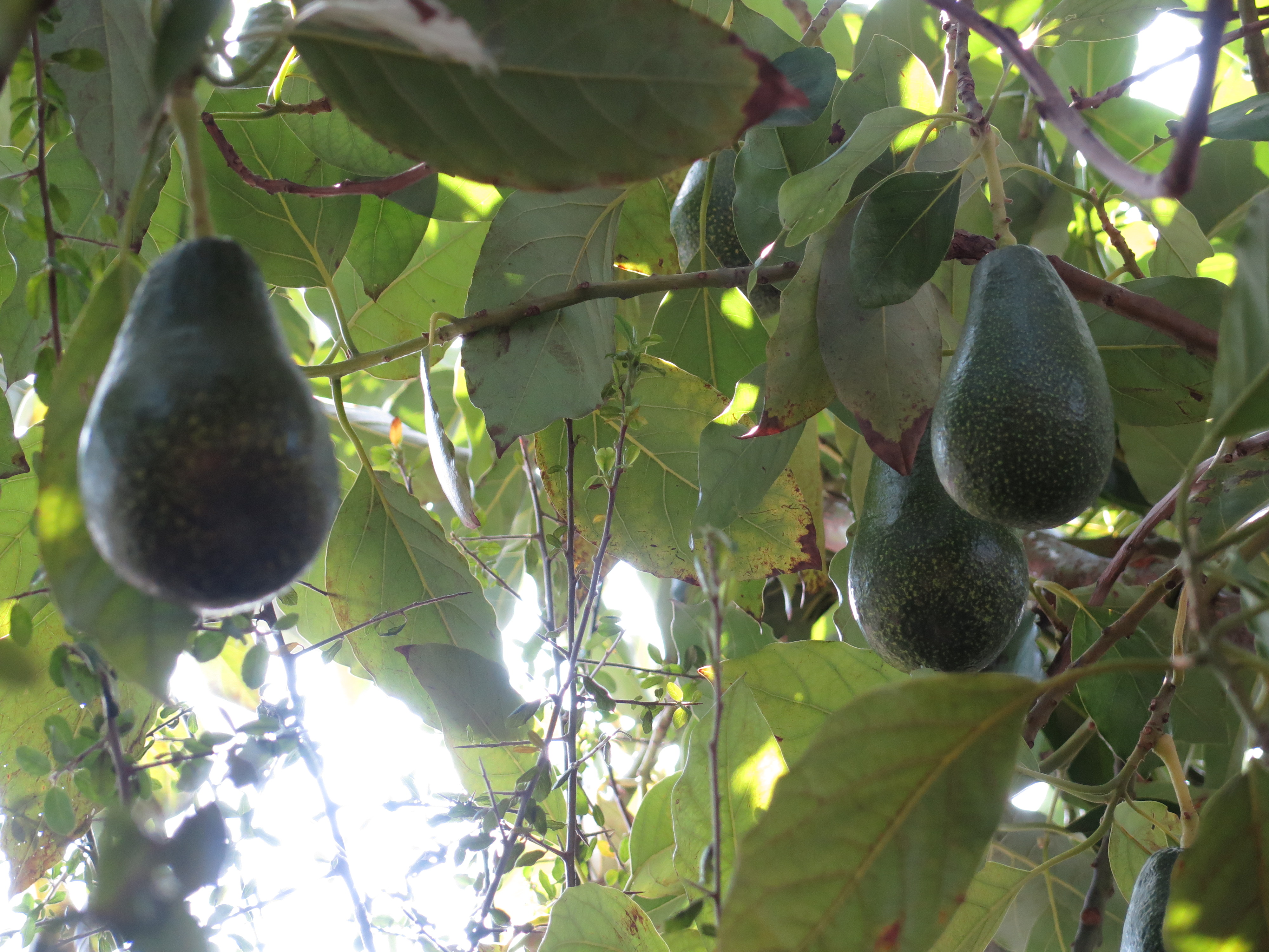 Frutti di avocado su una pianta ambientata a Roma (IT)